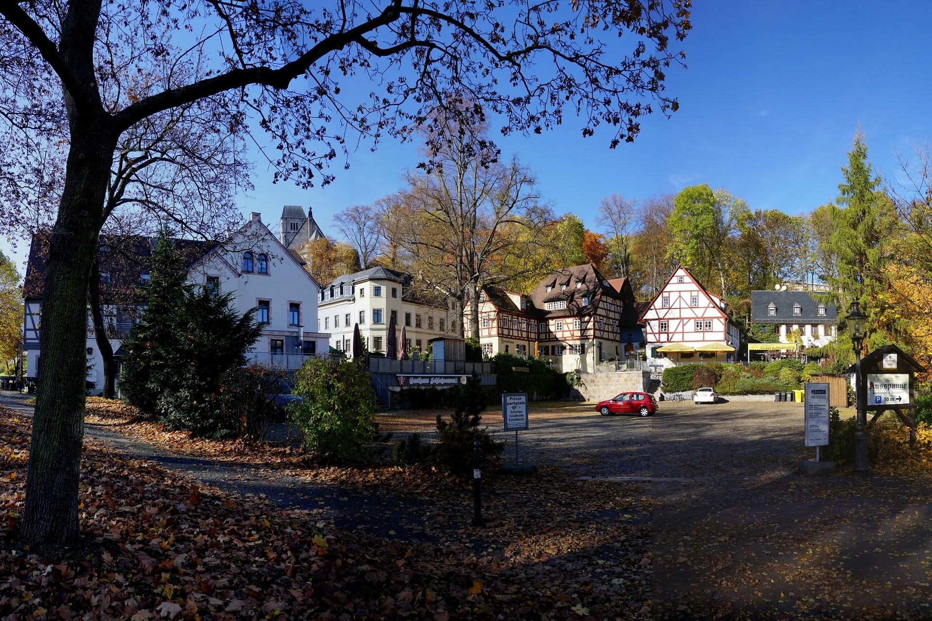 Das Fachwerkviertel am Unteren Schloßberg in Chemnitz, 2015